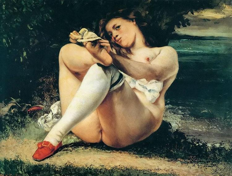 Gustave Courbet : La Femme aux bas blancs, huile sur toile, 65 x 81 cm.